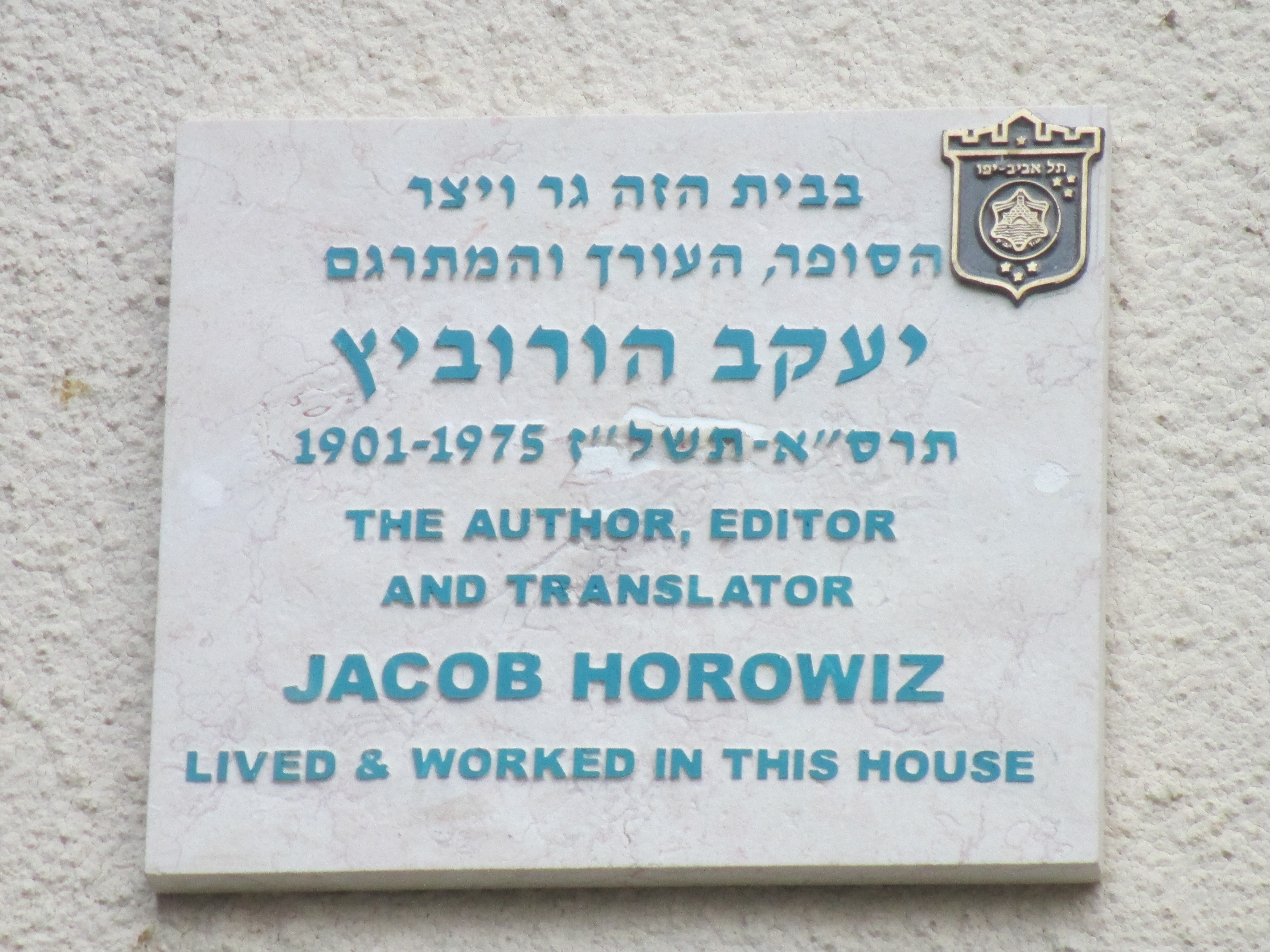 לוחית זיכרון ליעקב הורוביץ ברח' יצחק שדה 51 בתל אביב